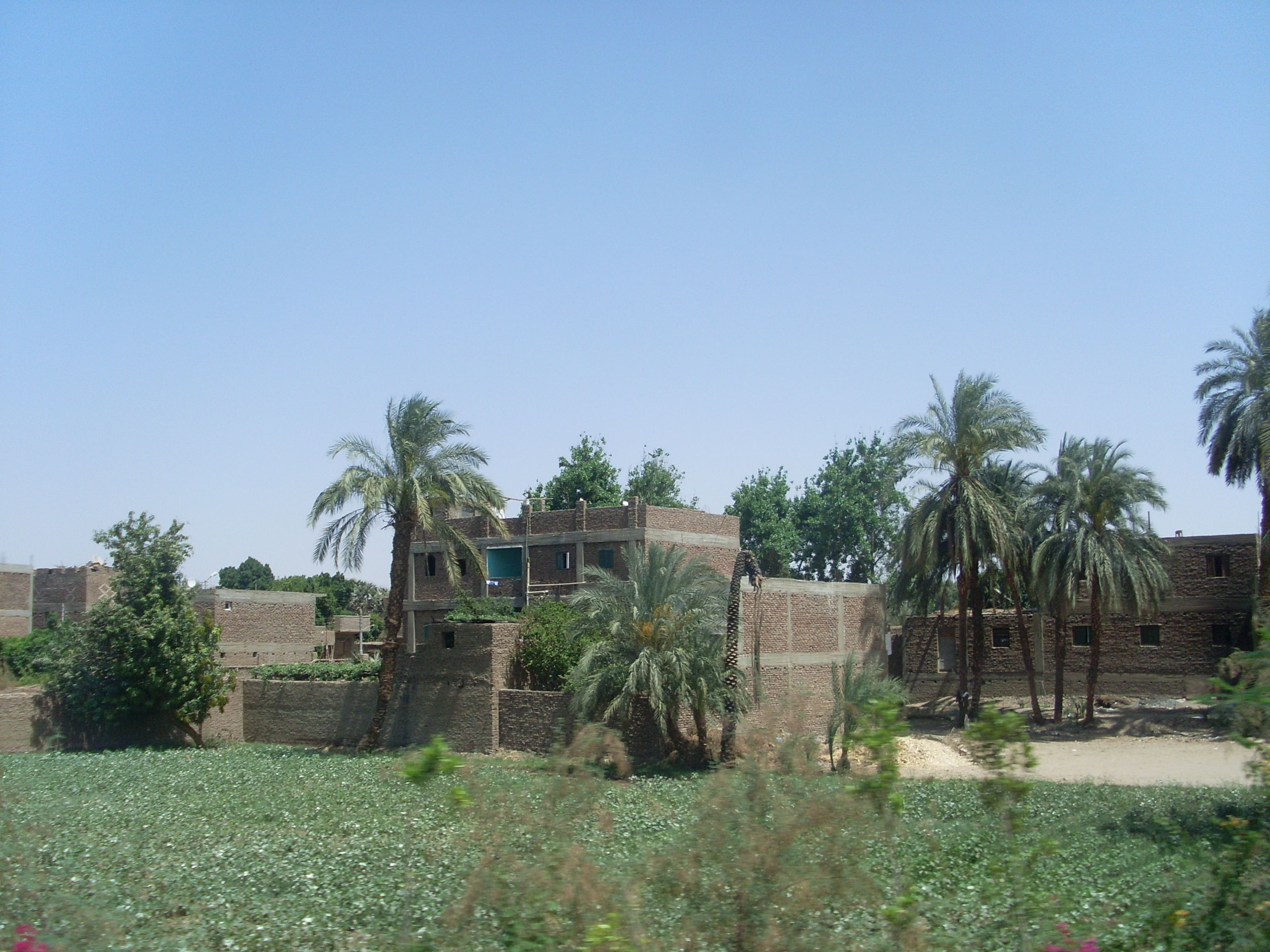 Casas, Valle del Nilo, Egipto, abril de 2009